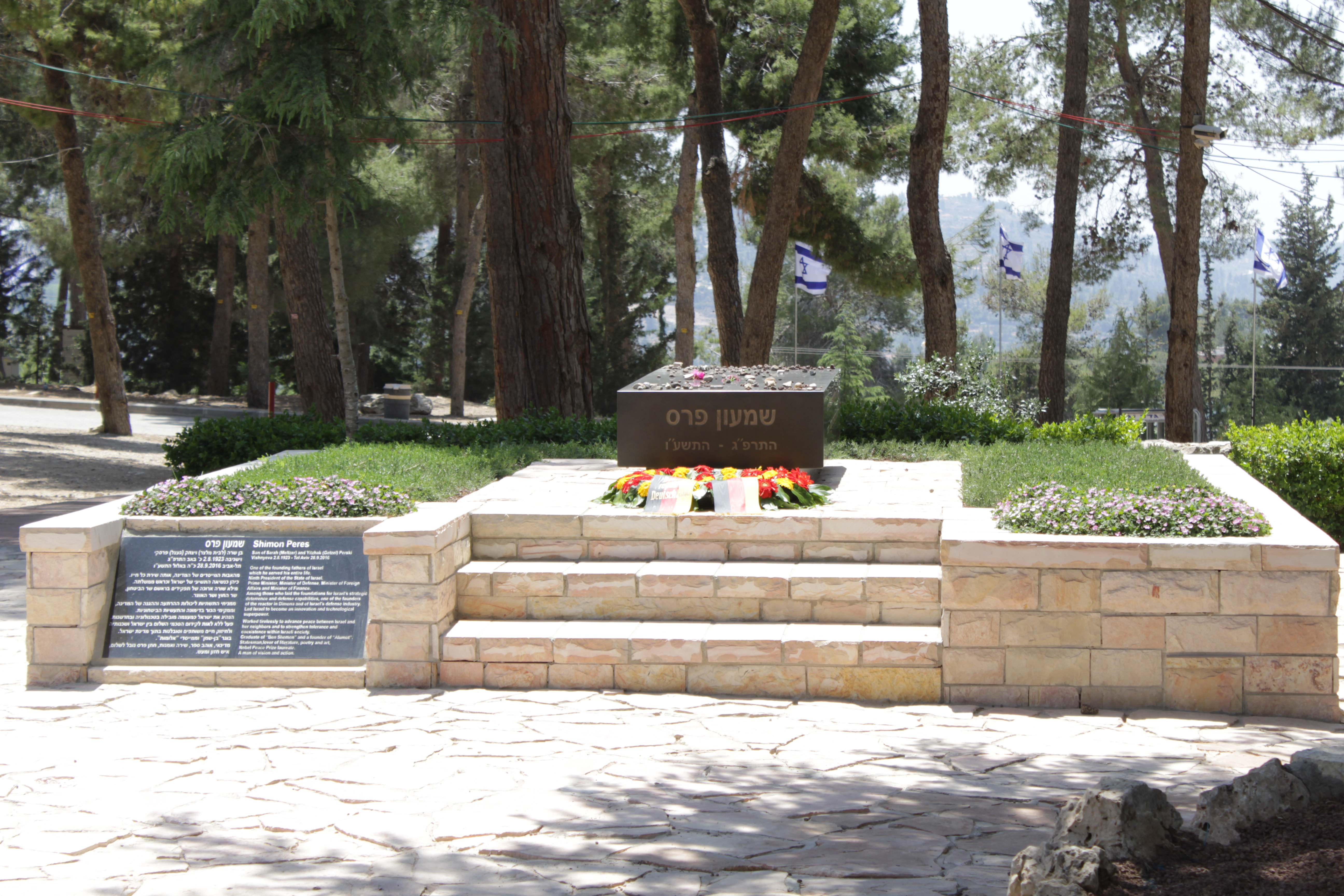 קבר שמעון פרס בחלקת גדולי האומה בהר הרצל